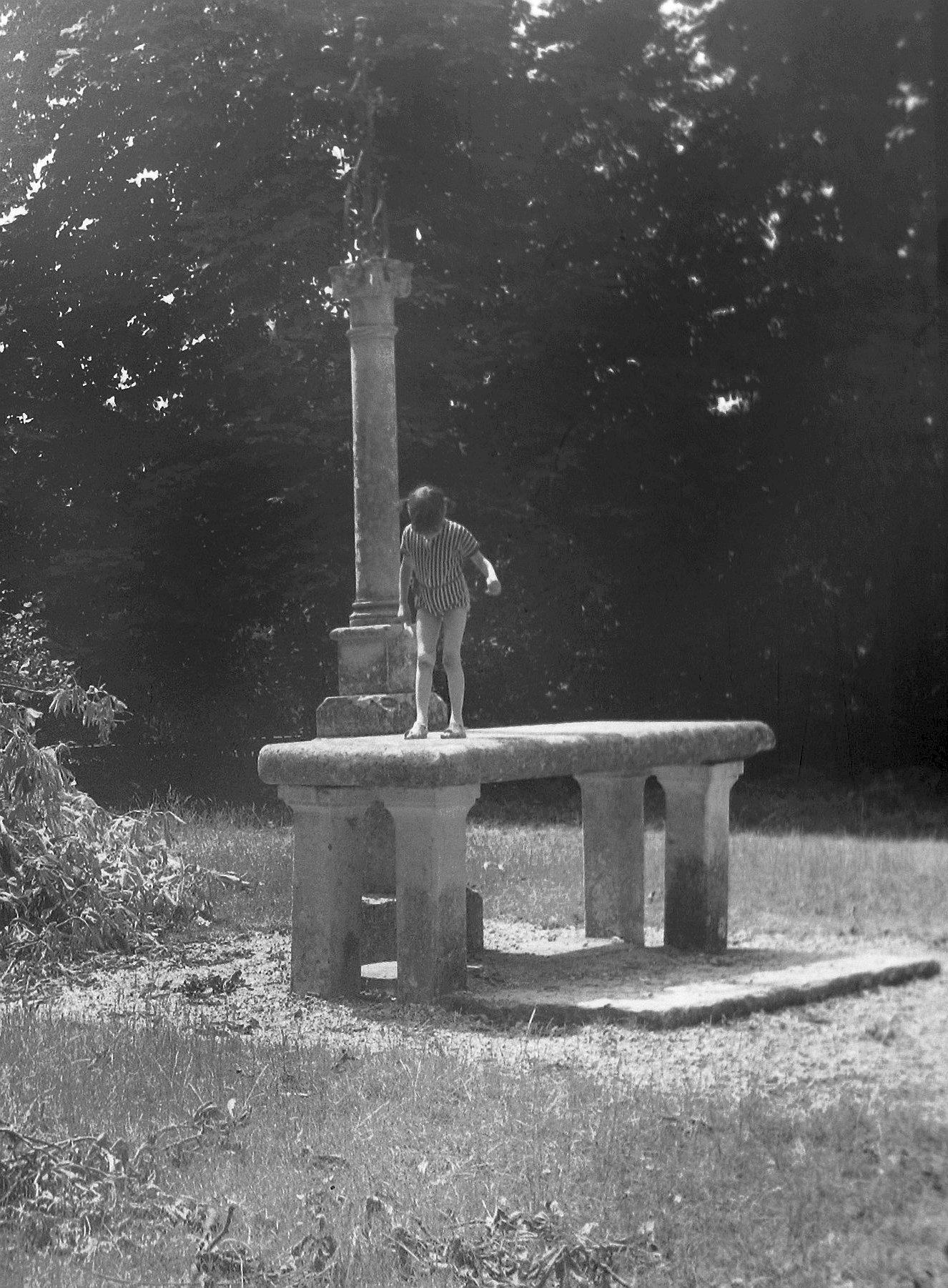 Clos Saint-Mauxe à Acquigny (France - Normandie - Eure). Lieu présumé du martyre des saint Mauxe et saint Vénérand. L'autel tel qu'il était à la fin des années soixante. Il est totalement détruit et disparu aujourd'hui.